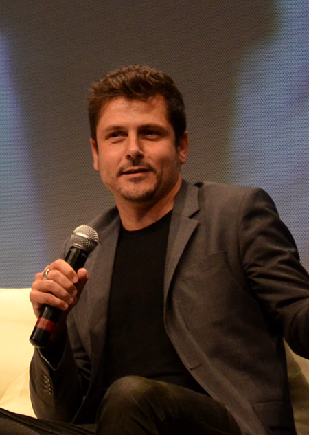 El director de cinema Kike Maíllo al programa Visto lo visto TV.